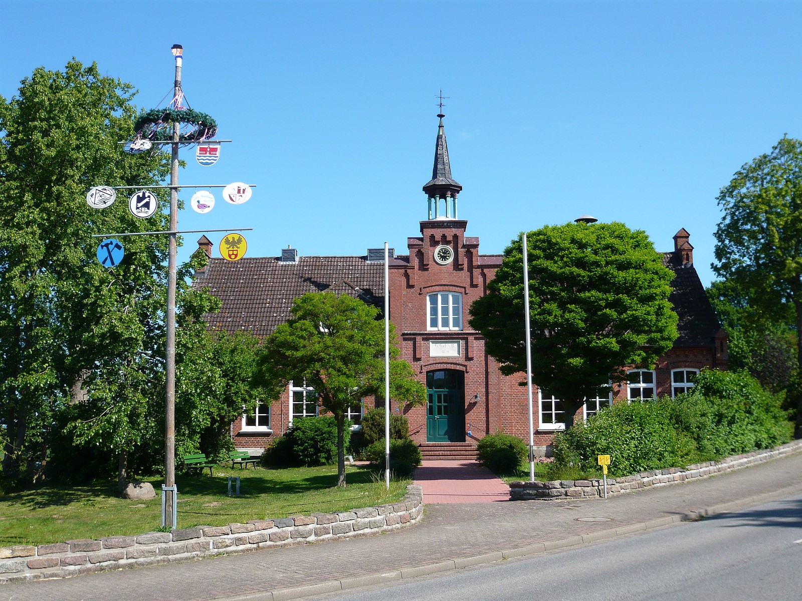 Das Dorfgemeinschaftshaus Alte Schule in Schlesen (Kreis Plön).